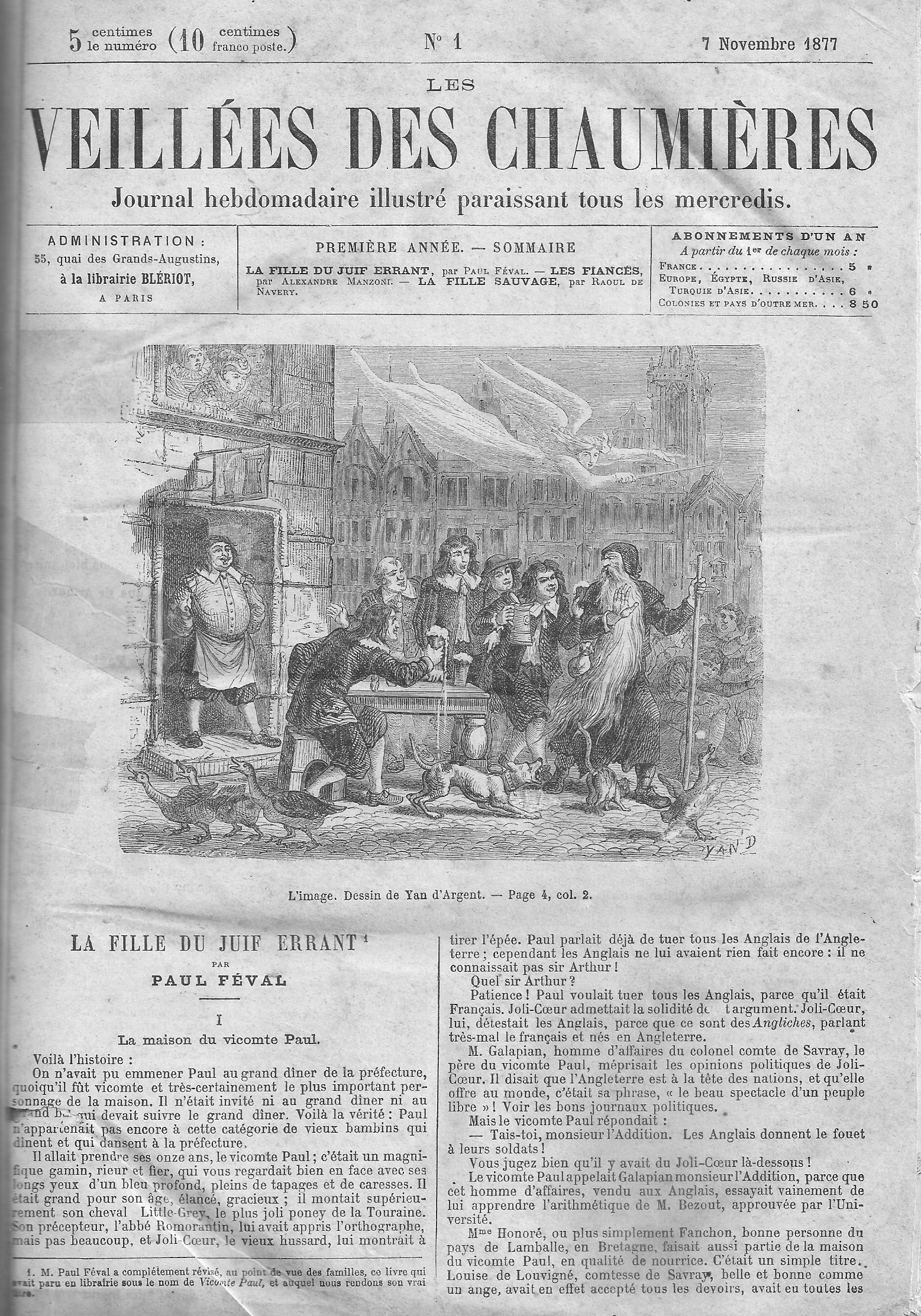 Revue Les Veillées des chaumières n°1 (7 novembre 1877), page 1/8. Figurent dans ce numéro les premiers épisodes de trois feuilletons : La Fille du Juif errant de Paul Féval, illustré par Yan' Dargent, Les Fiancés d'Alexandre Manzoni, traduit par Max Desnoyers et illustré par Belin et La Fille sauvage de Raoul de Navery. Ce numéro est édité par la librairie Blériot, 55 quai des Grands Augustins à Paris et imprimé par Charaire à Sceaux.